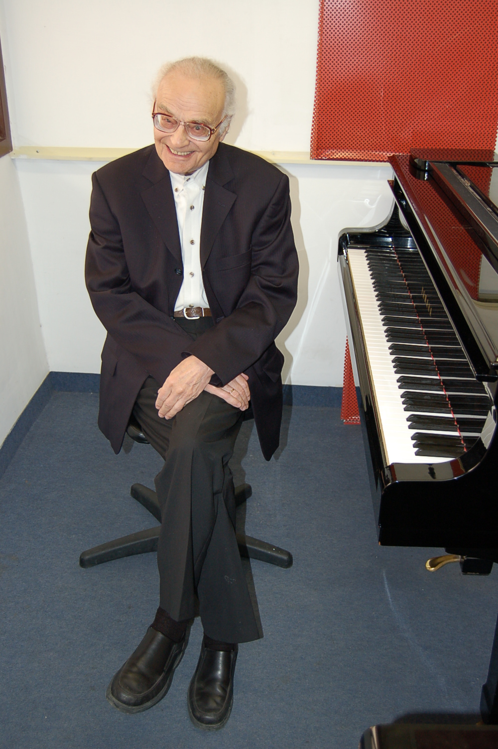 Выдающийся советский и израильский пианист и педагог